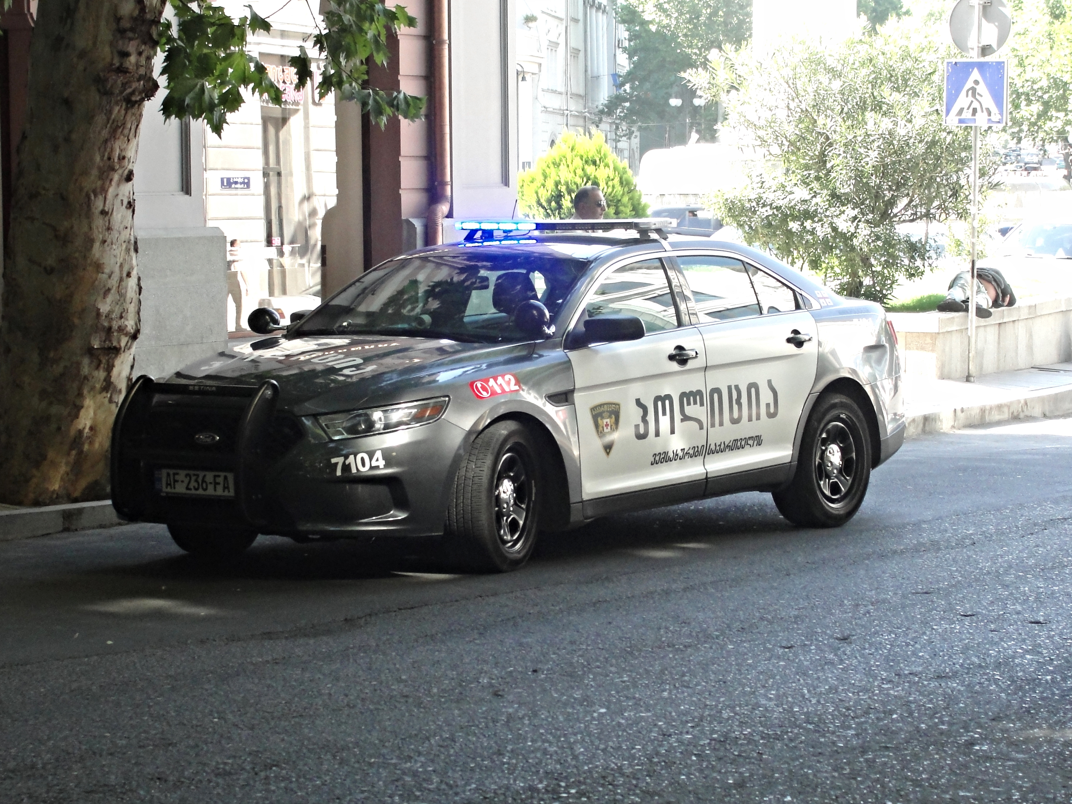 Police car in Tbilisi